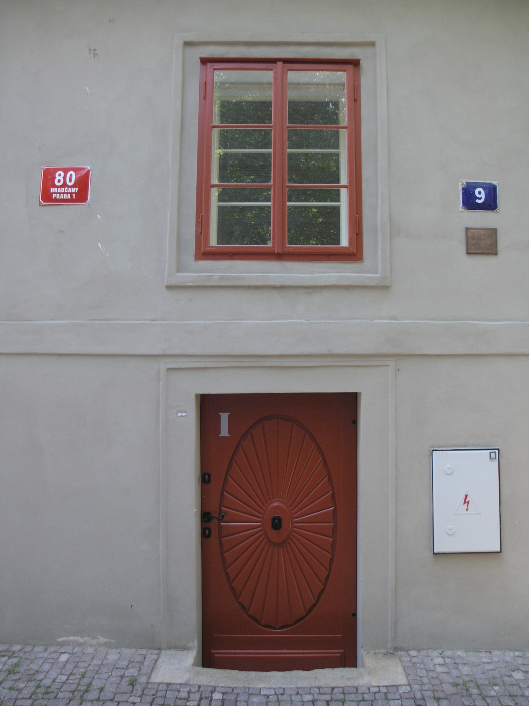 Praha, Hradčany - detail fasády domu U svatého Michala (Nový svět 9)